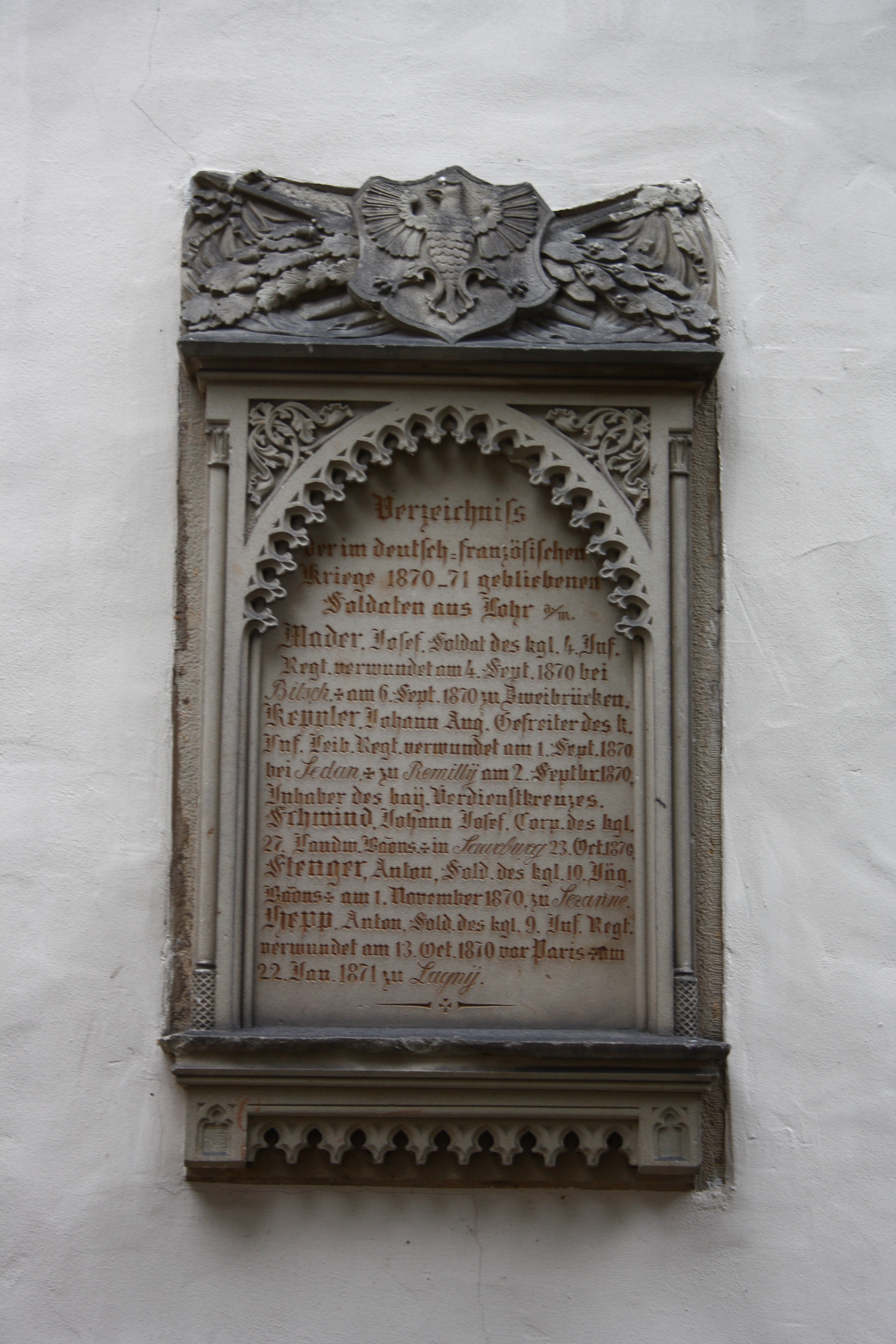 katholische Pfarrkirche St. Michael in Lohr am Main im Landkreis Main-Spessart (Bayern)